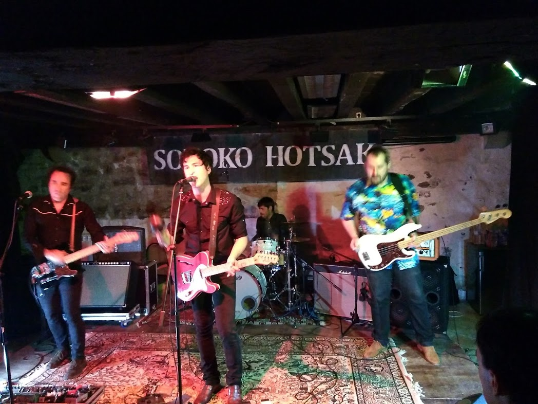 Atom Rhumba Elgoibarko Kultur Etxeko sotoan "Sotoko Ahotsak" kontzertu sortaren barruan